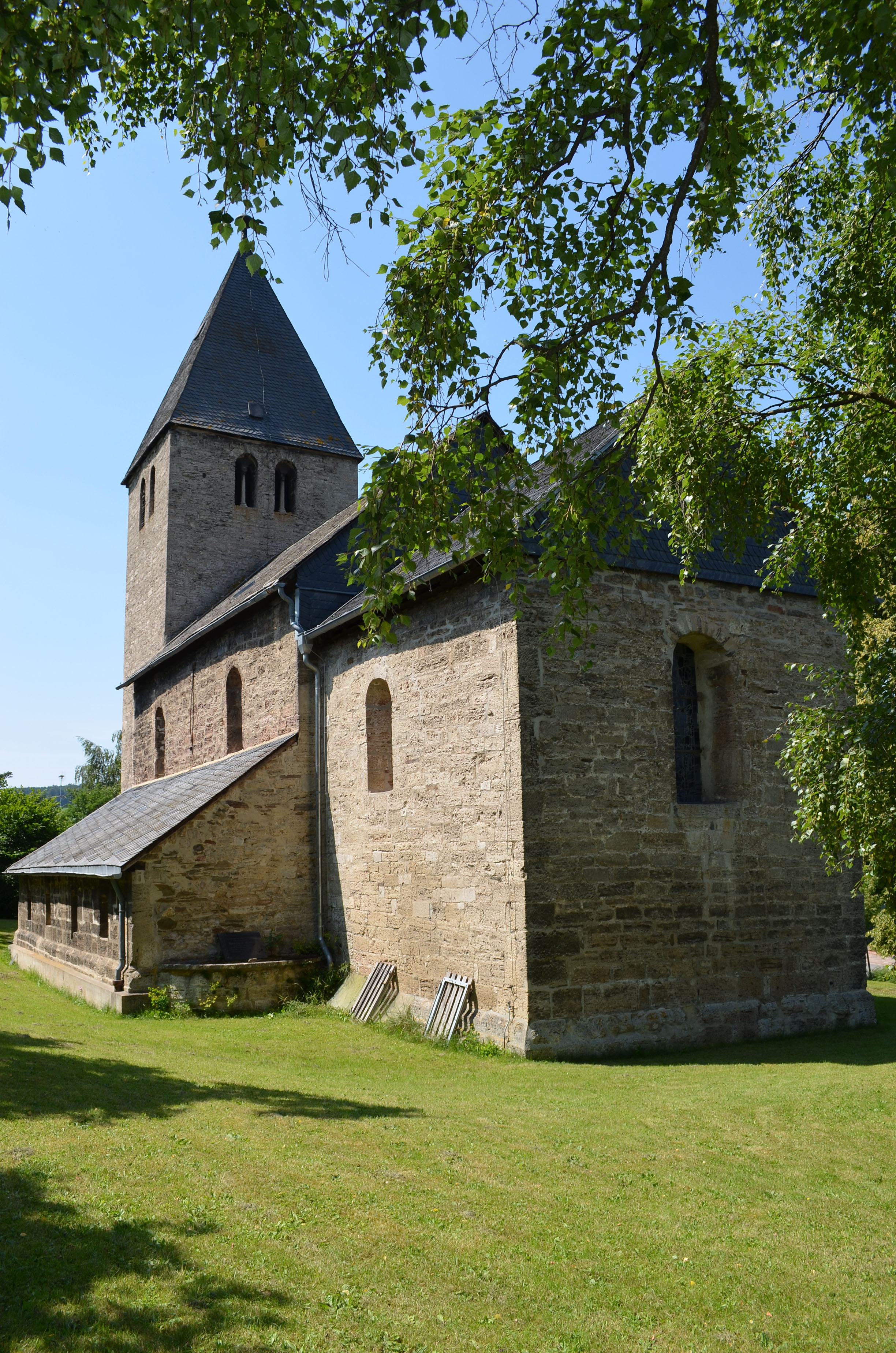 Heringhausen, Diemelsee, Kirche St. Barbara, Außenansicht 9